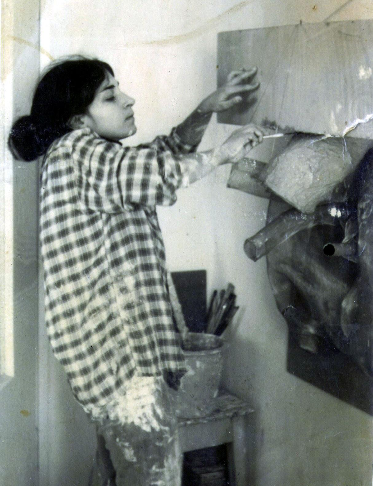 יוכבד וינפלד